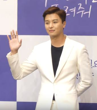 8월 1일 오후 서울시 구로구 라마다서울신도림호텔에서 KBS2 새월화드라마 '너의 노래를 들려줘' 제작발표회가 열려 배우 연우진X김세정이 참석해 포토타임 행사를 갖고 있다.